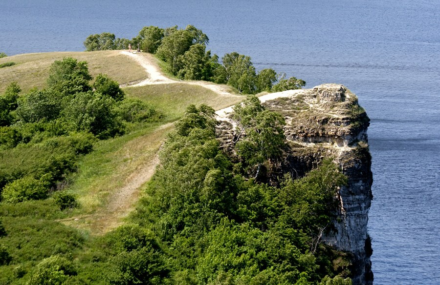 Девья гора, Жигулёвские горы, Россия